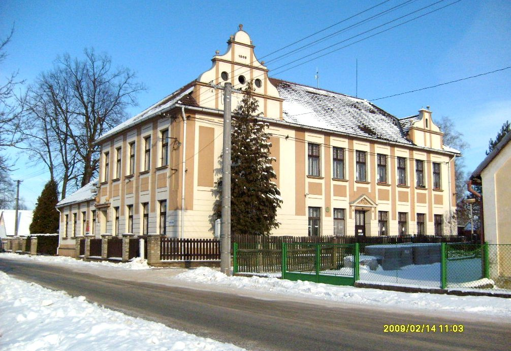 Klikov - škola z roku 1908